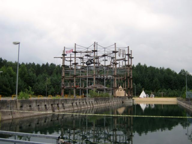 Kletterturm der HöhenwegArena, Camp Reinsehlen, Schneverdingen